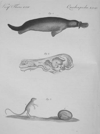 Platypus plate. Reproduced from Bilderbuch für Kinder: enthaltend eine angenehme Sammlung von Thieren, Pflanzen, Blumen, Früchten ...